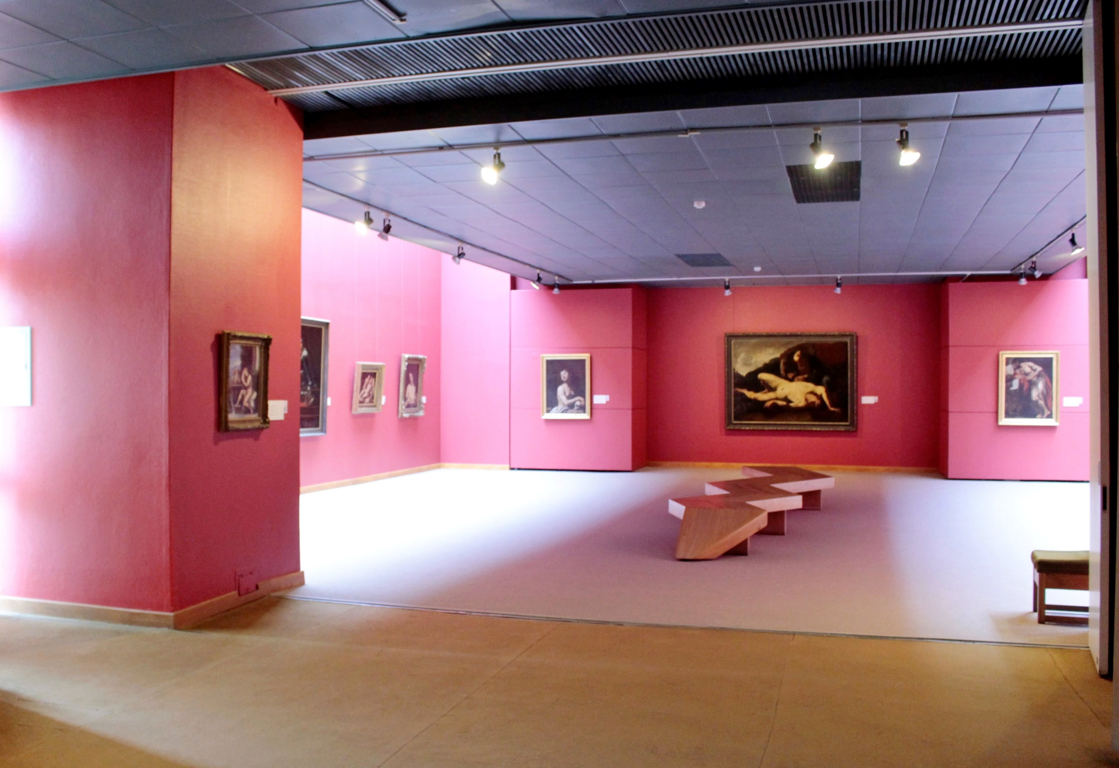 M. Žilinsko dailės galerijos ekspozicijų salė.